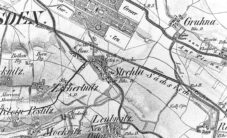 Original image description from the Deutsche Fotothek Dresden-Strehlen. Oberreit, Sect. Dresden, 1821/22